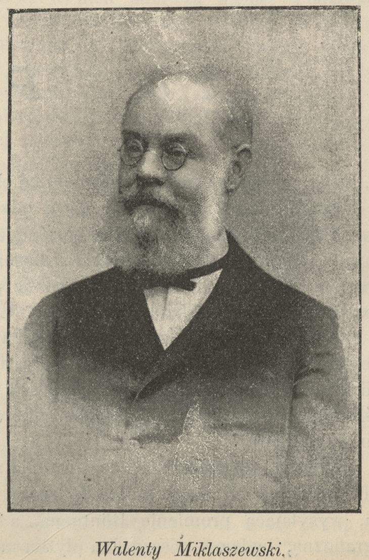 Walenty Miklaszewski